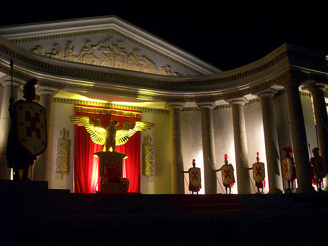 Nova Jerusalém em 2008, Pernambuco, Brasil.